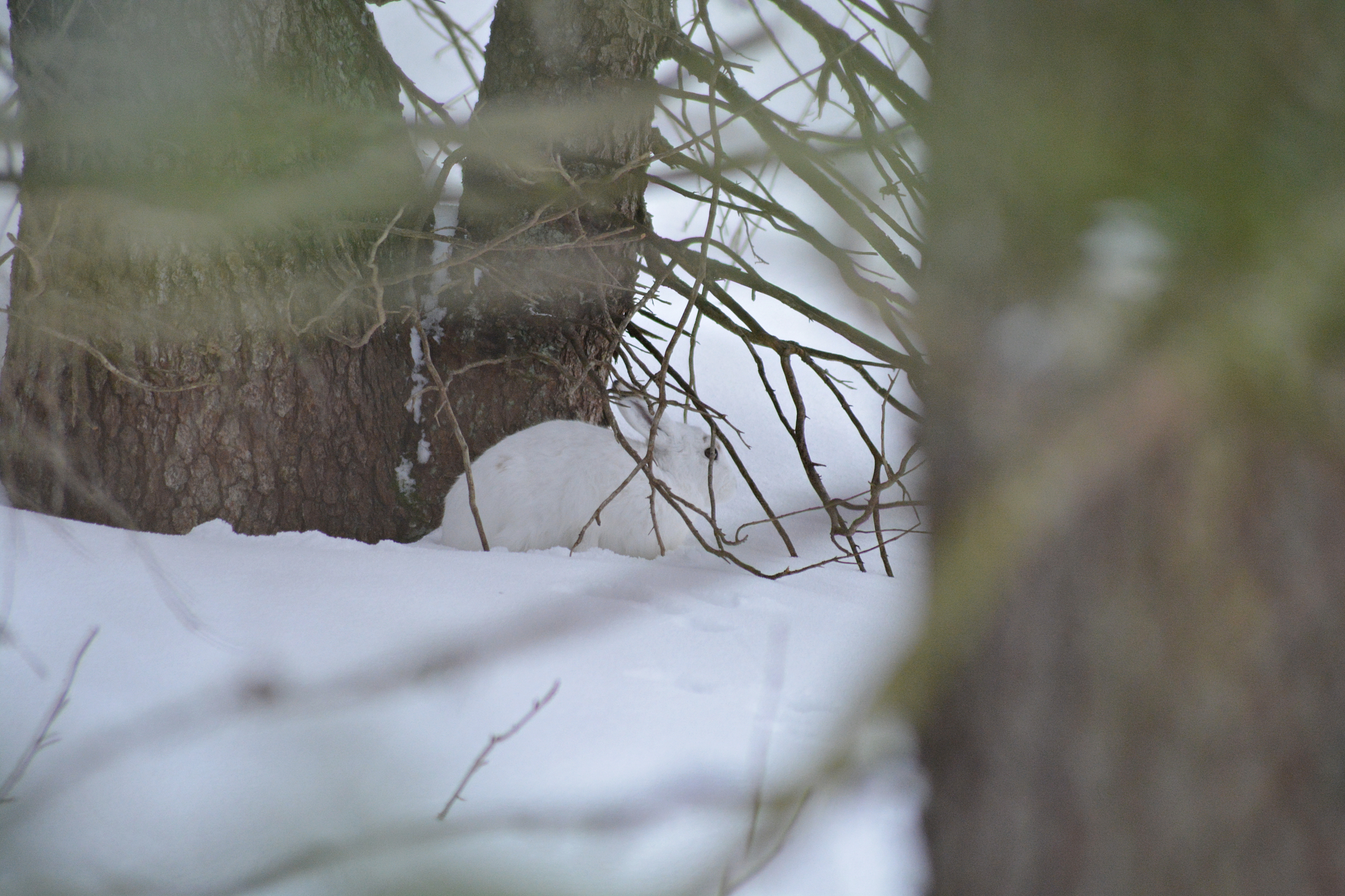 Schneehase in den Chiemgauer Bergen in Deckung